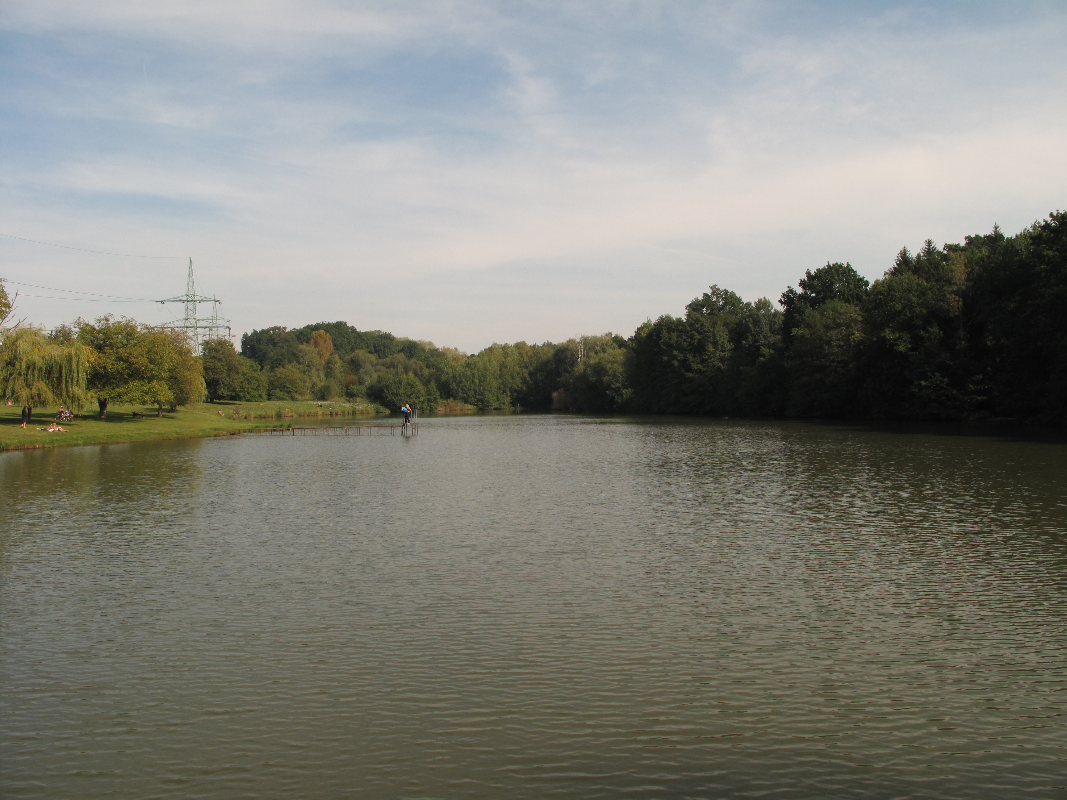 Eliška. Praha, Česká republika.